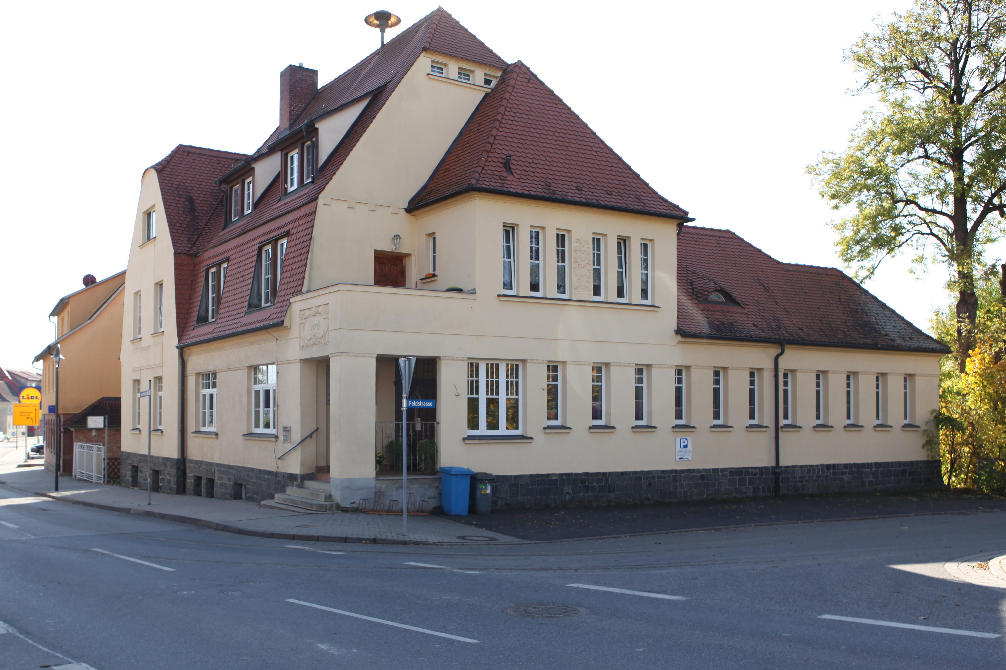 Volksbad in Römhild, 1912, gestiftet Christian Heurich, Architekt Max Böhme